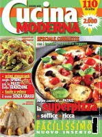 Copertina della rivista Moderna giugno 2001, Arnoldo Mondadori Editore.